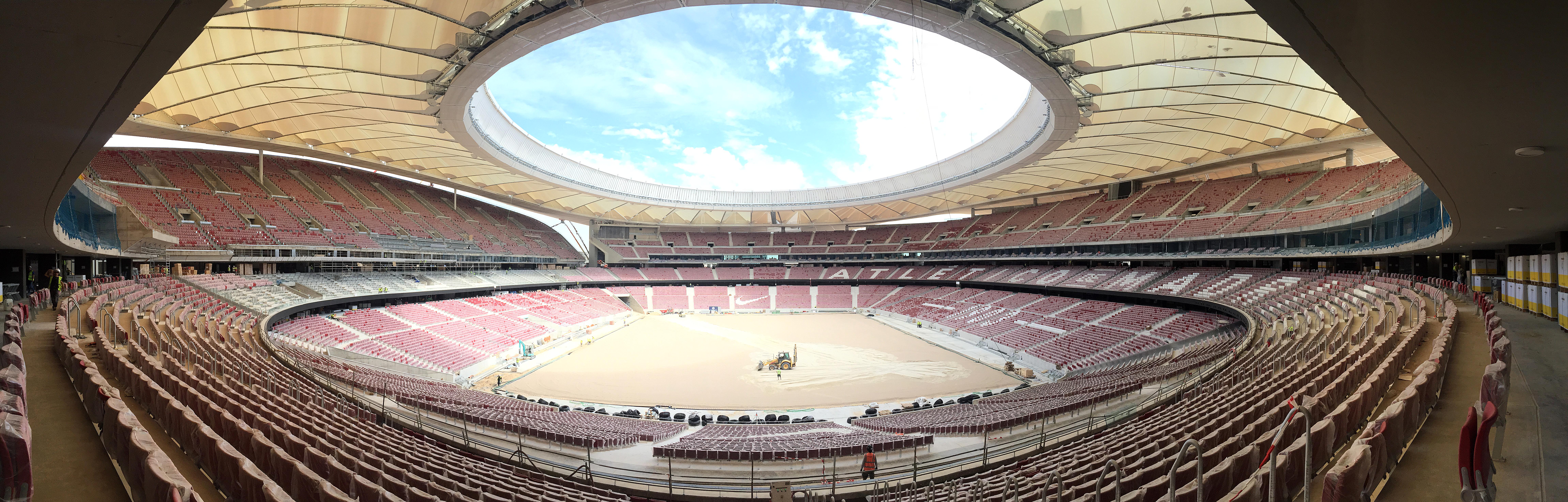 La presidenta de la Comunidad, Cristina Cifuentes, acompañada del presidente del Atlético de Madrid, Enrique Cerezo, ha visitado las obras del nuevo estadio del Atlético de Madrid, que se inaugurará el 16 de septiembre